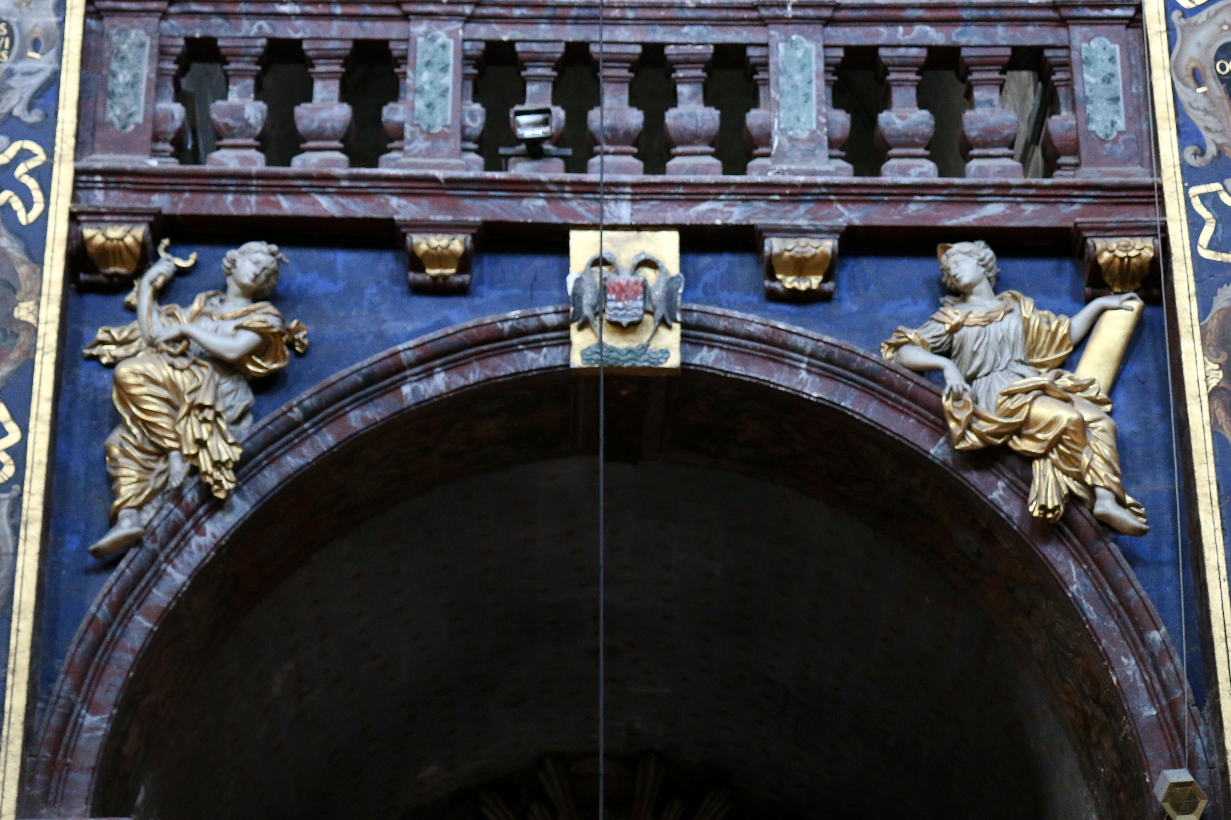 Collégiale Notre-Dame des anges- Sculptures de Jean Péru (1650-1723) représentant des figures allégoriques : à droite la paix et à gauche la tempérance.